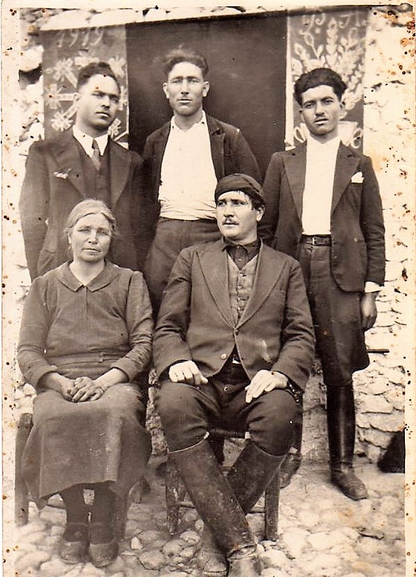 Οικογενειακή φωτογράφιση, έτος 1919